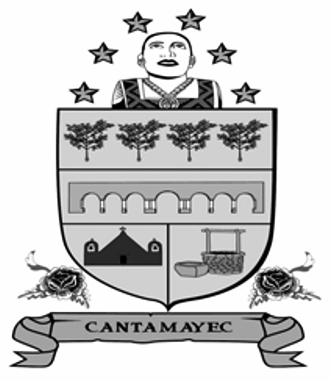 Escudo del Municipio de Cantamayec.